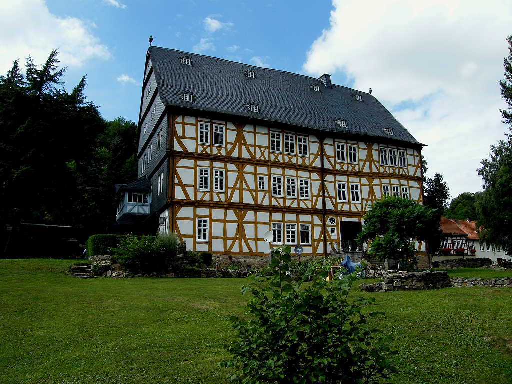 Thalitter - ehem. Jagdschloss Landgrafen von Hessen-Darmstadt. 1718-1868 Bergamtsgebäude